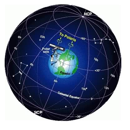 mokhtasat